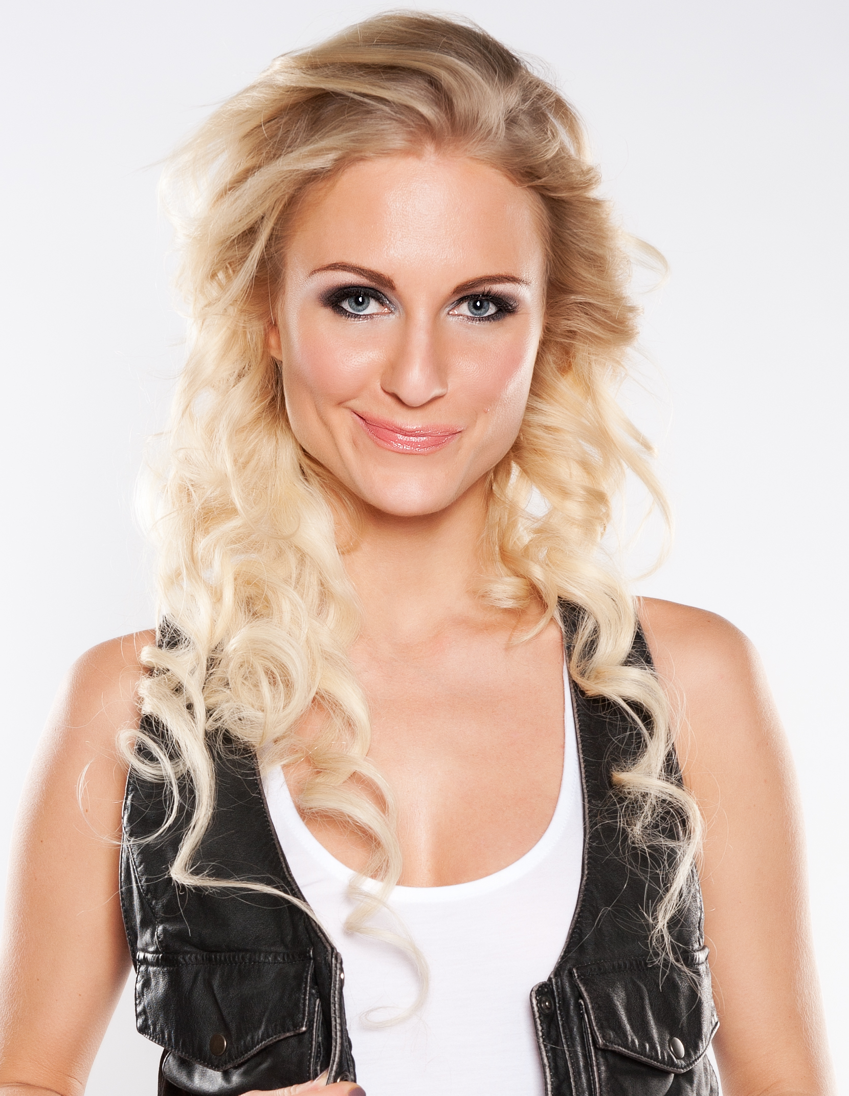 Катя Гордон